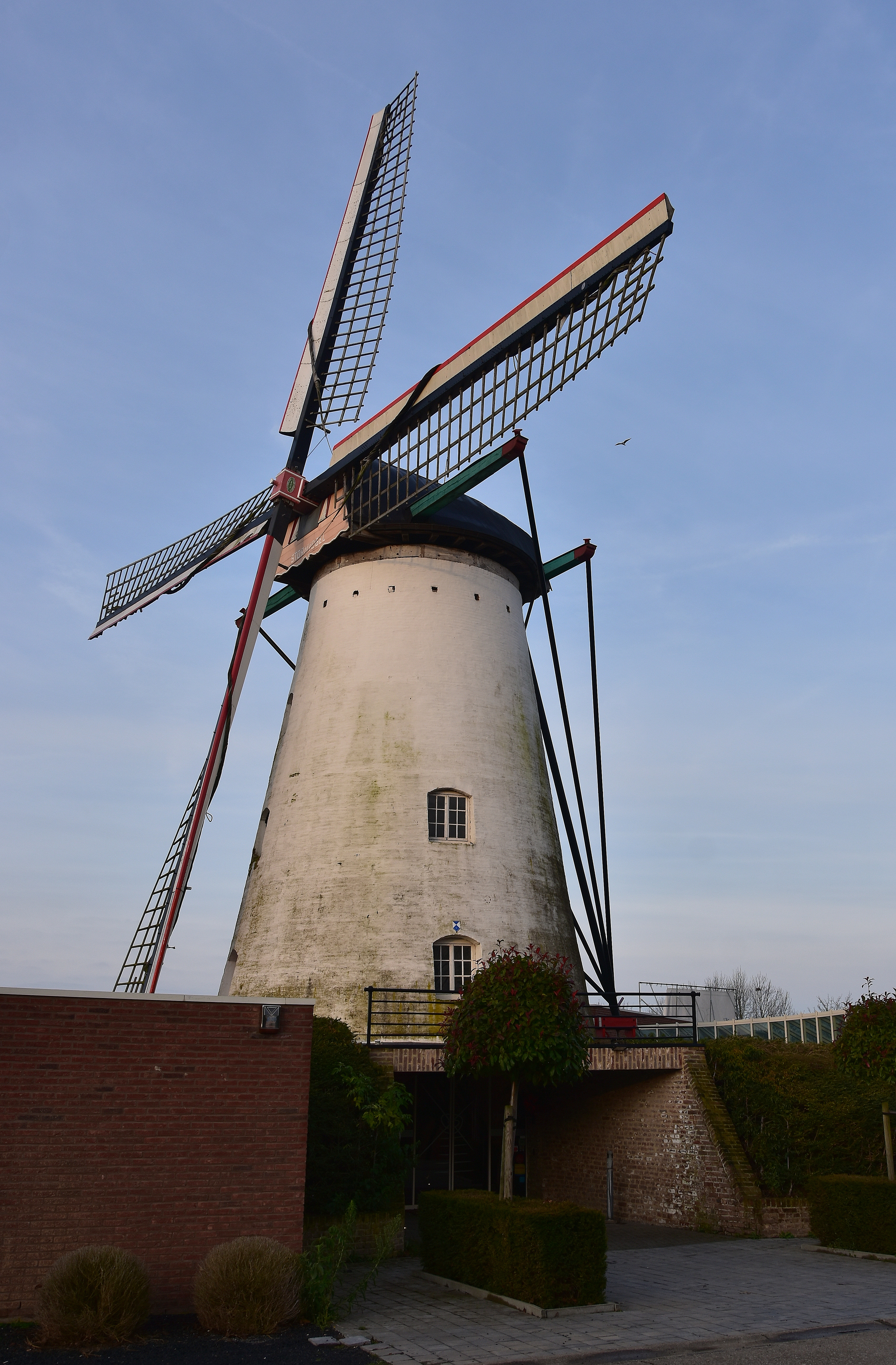 Stormvogel Boorsem (1149) 28-12-2019 9-39-59